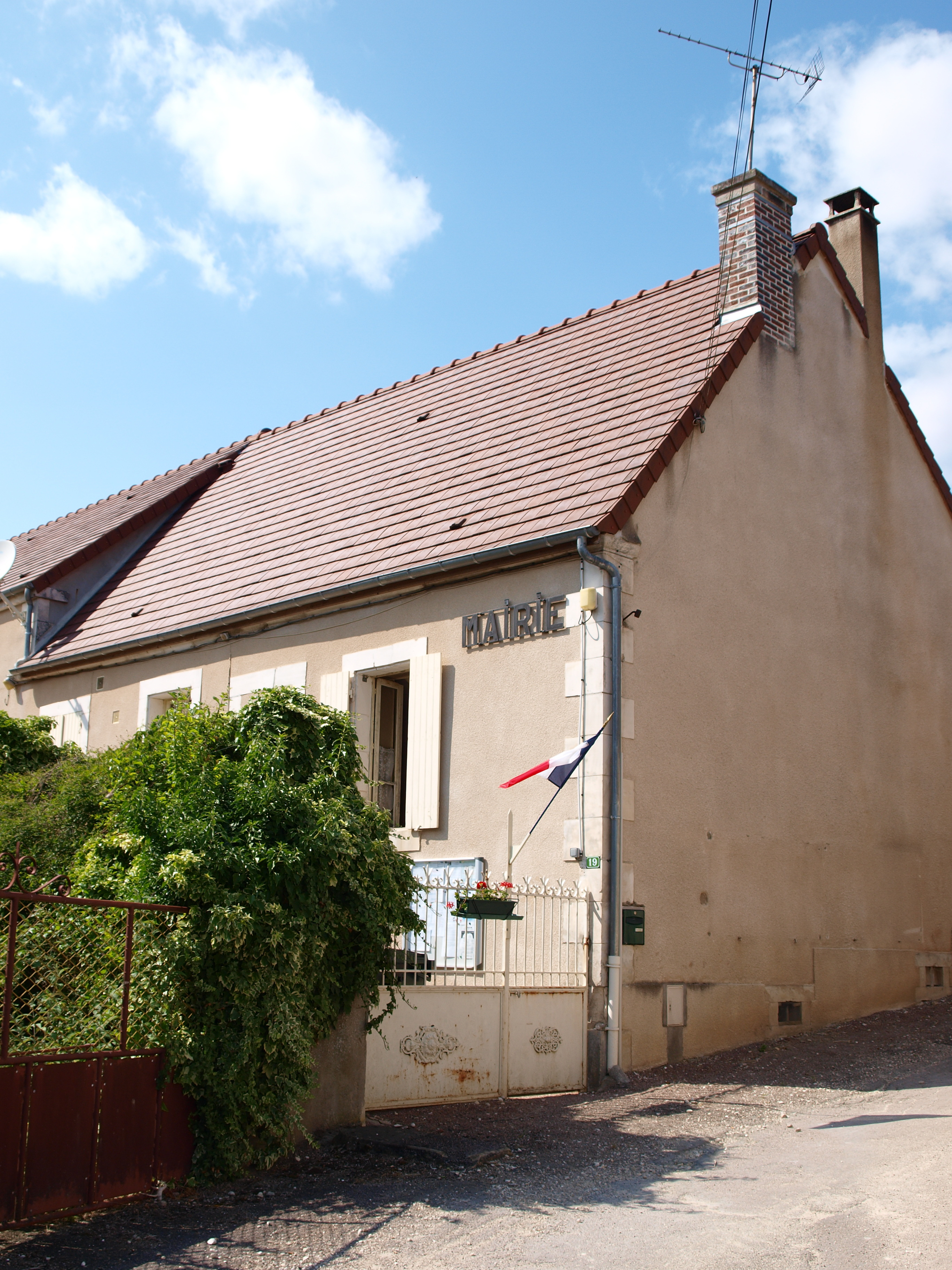 Mouffy (Yonne, France) ; la mairie.